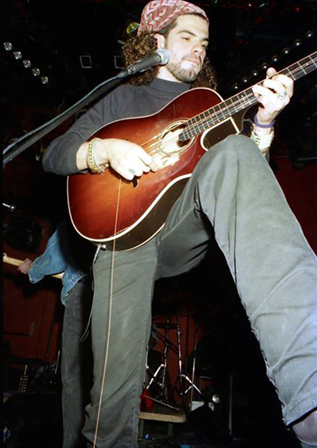 חיים צינוביץ בהופעה